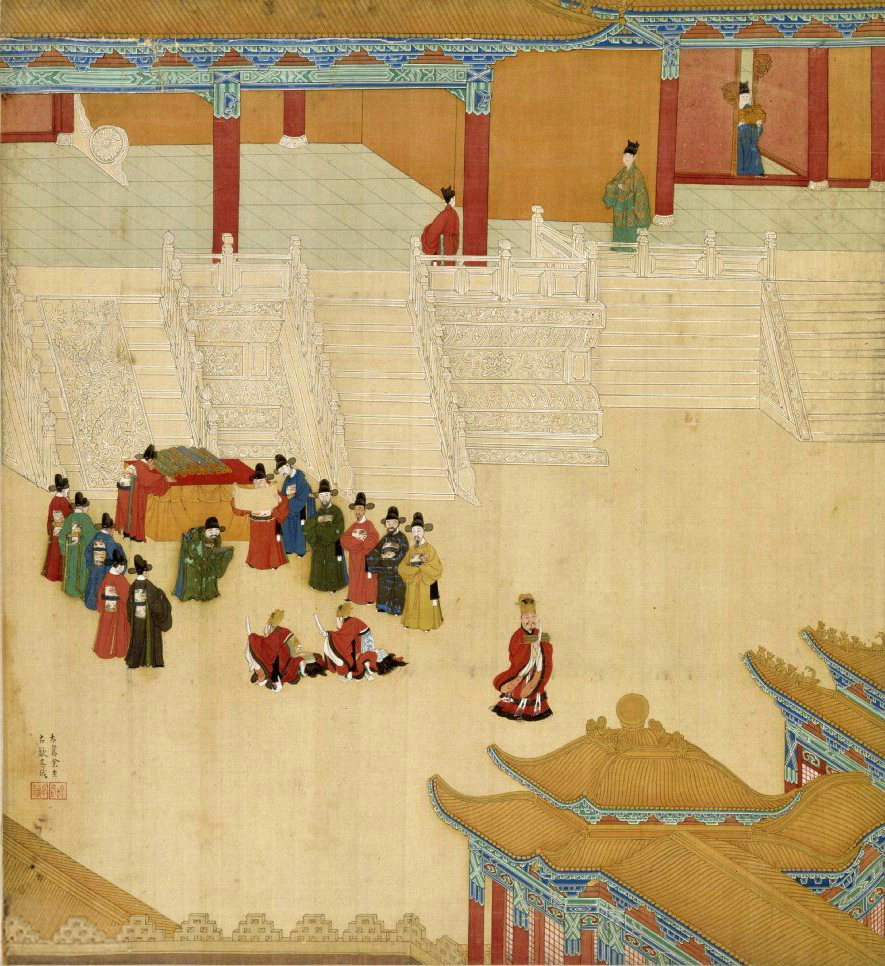 幽隴沾恩，時年五十一